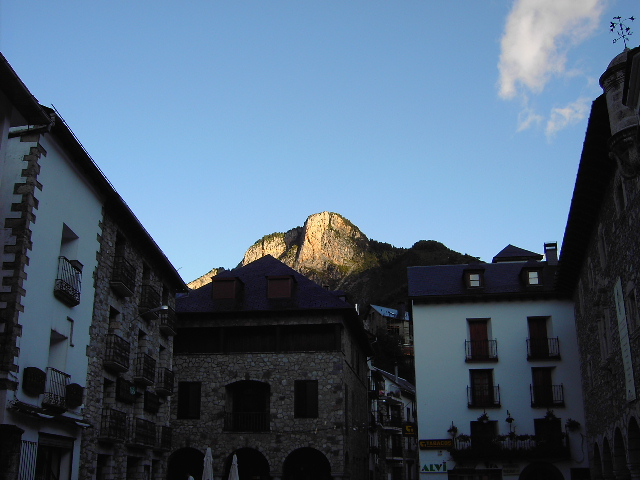 Punta d'El Cuezo (2049m) vista por encima de los tejados de Bielsa.